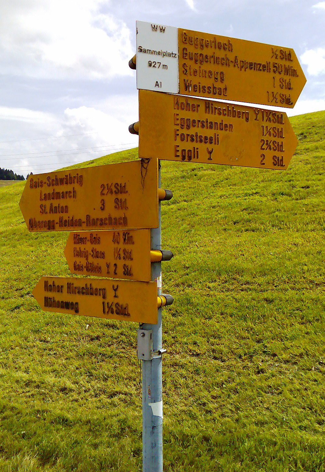 Blick aus Norden auf den Wegweiser für Wanderwege ab dem Sammelplatz in Meistersrüte. Er steht nordöstlich der gleichnamigen Station der Appenzeller Bahnen. Auf dem weissen Mittelteil steht der Ortsname; Sammelplatz - und darunter die Höhenangabe; 927 m